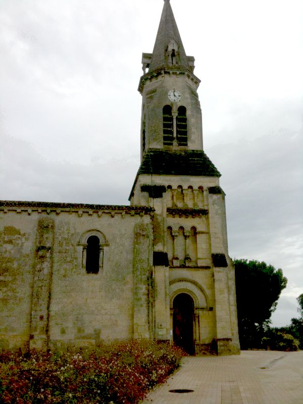 Eglise de Bouliac 33